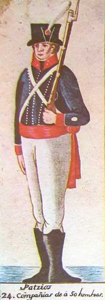 Uniforme de oficial del Regimiento de Patricios (tropa)